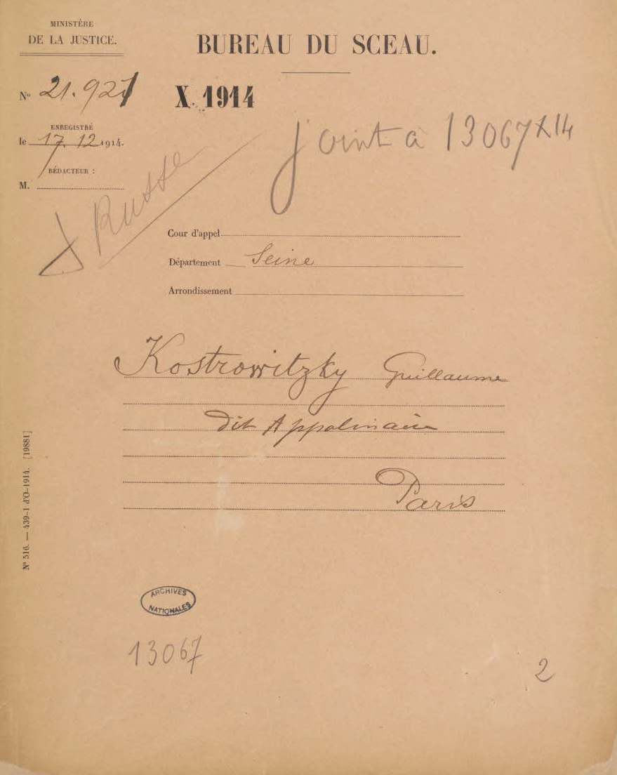 Dossier de naturalisation de Guillaume Kostrowitzky, dit Apollinaire (Rome 1880-Paris 1918).